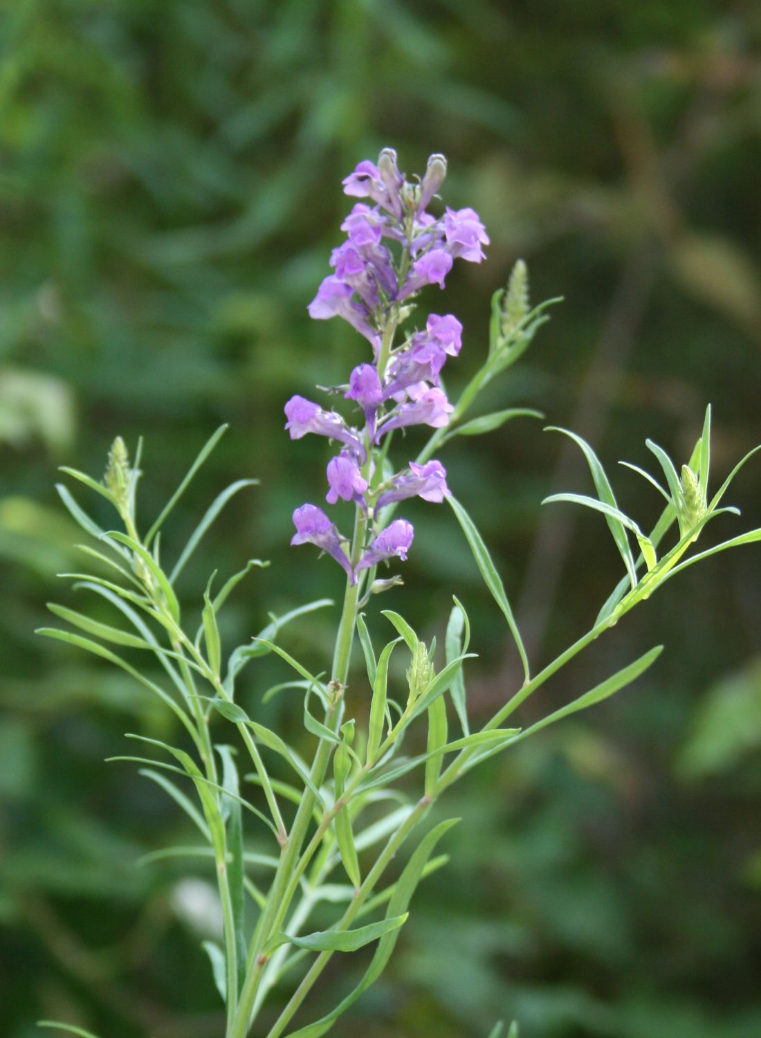 Linaria purpurea, Wegerichgewächse (Plantaginaceae) - Italien/Italia/Italy: Kalabrien/Calabria, Prov. Reggio Calabria, Aspromonte, bei San Peri, SSE Scilla